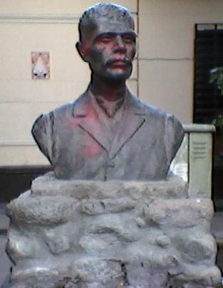 Busto de Ramón Gil Barros en la ciudad de Córdoba (Argentina).